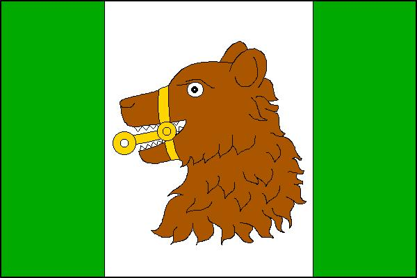 Česky: vlajka obce Kunčice nad Labem